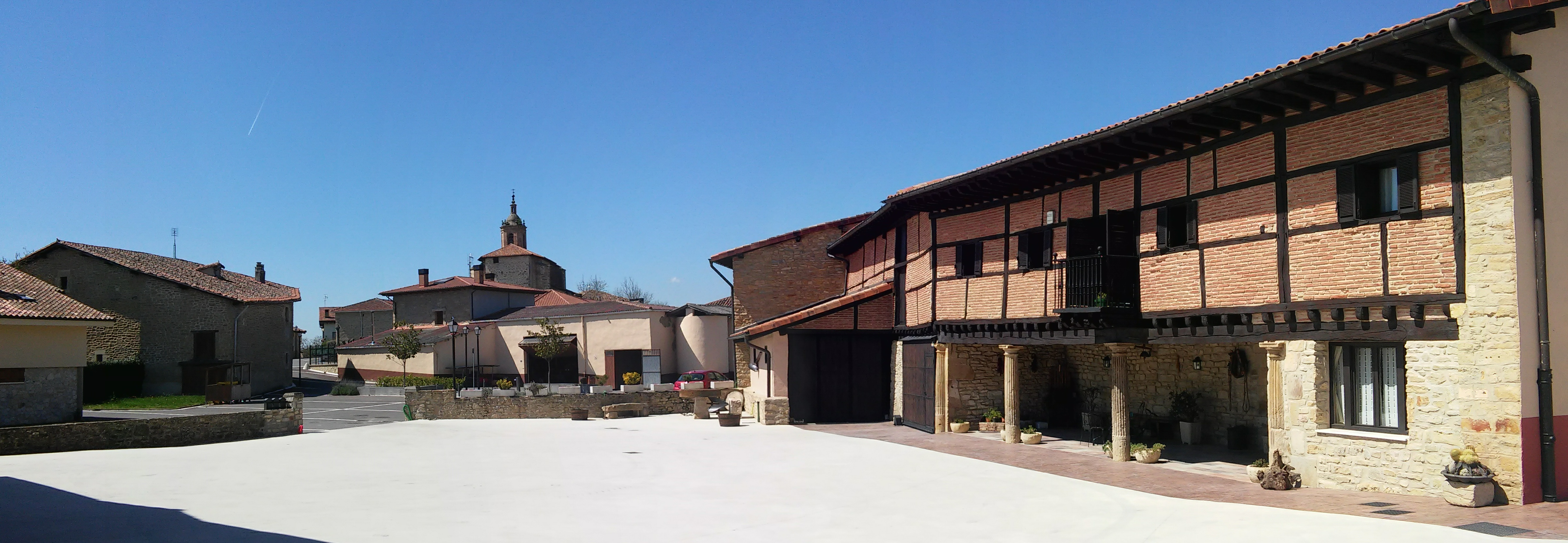 Burguko erdigunea (Araba)